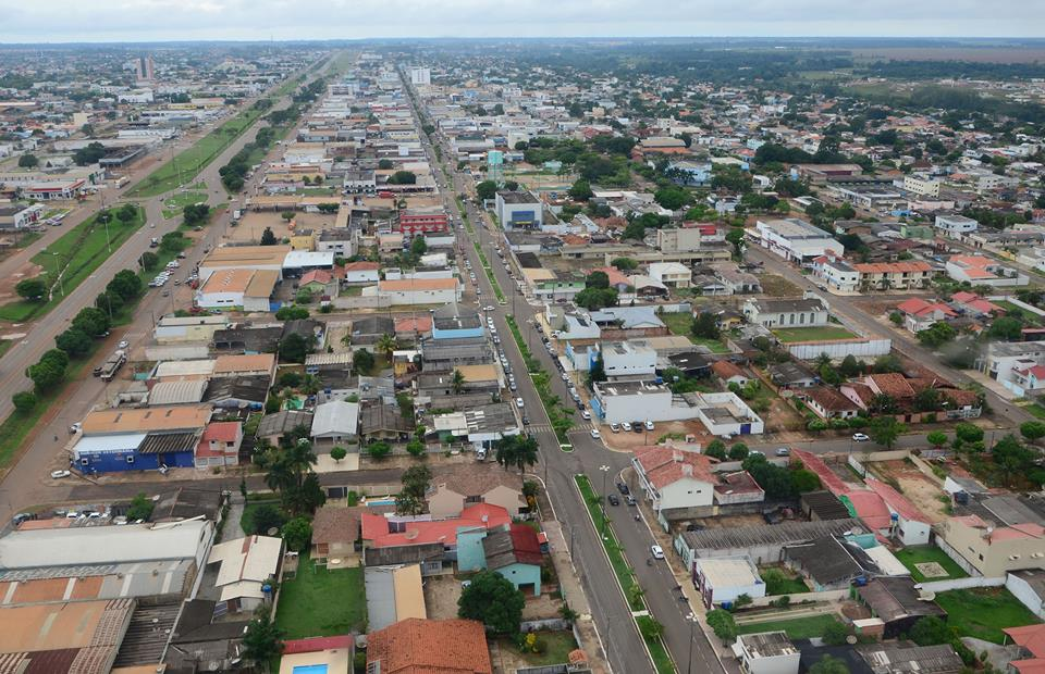 Vilhena